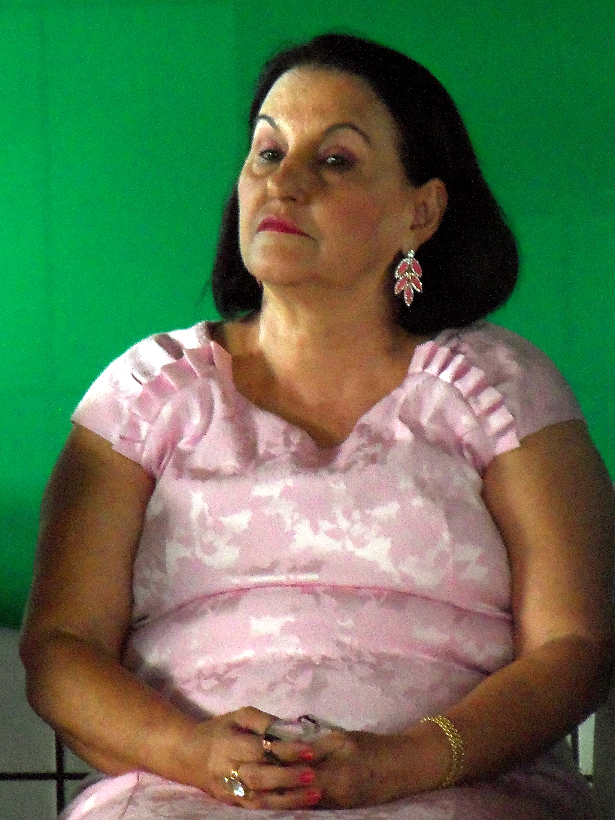 Maria Dulce Rudio Soares (PMDB), prefeita e ex-vereadora de Fundão, Espírito Santo